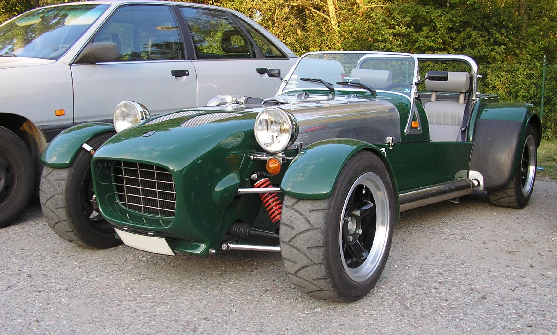 A 1995 Pegasus 7 Plus.